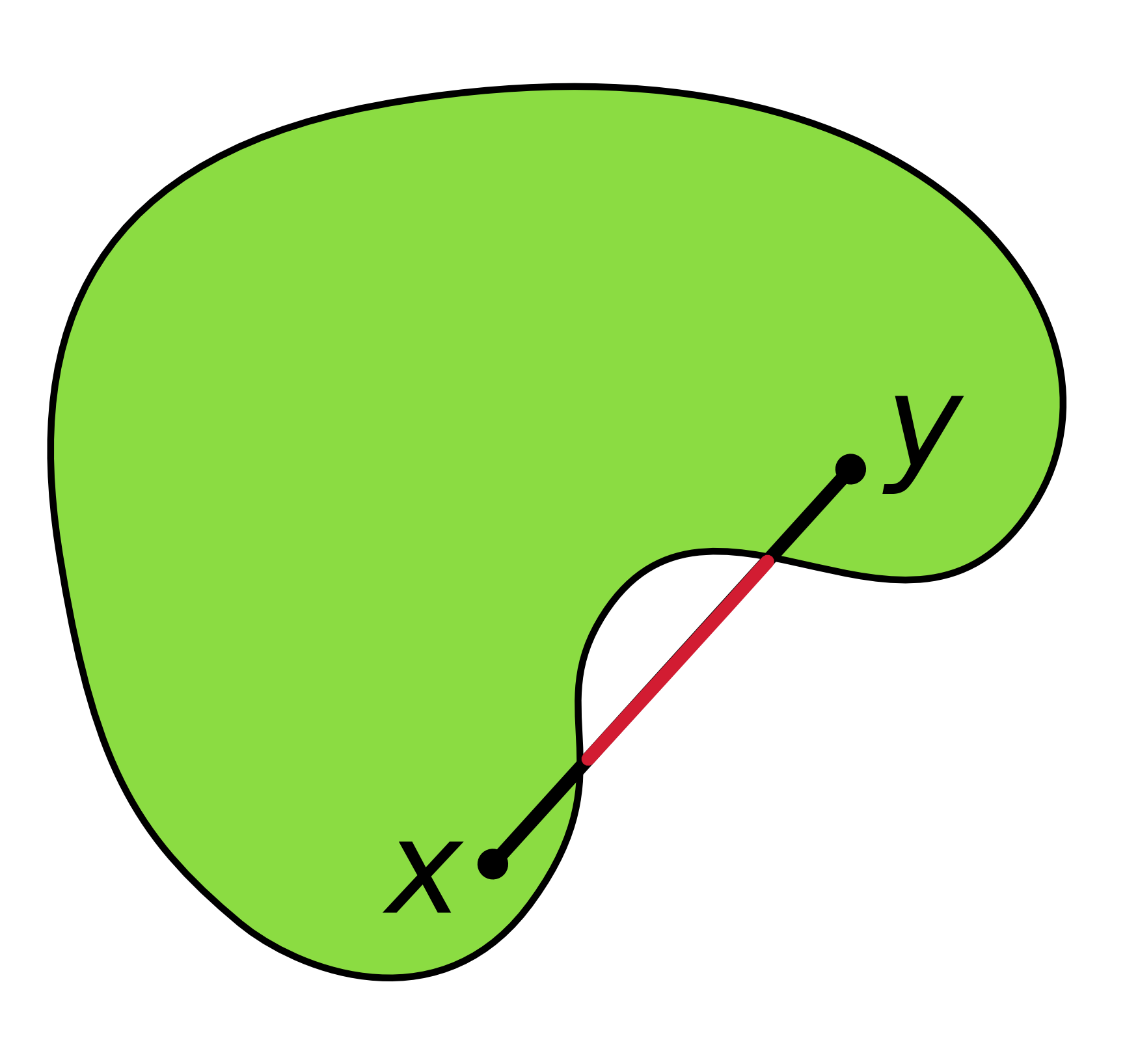 A Concave set